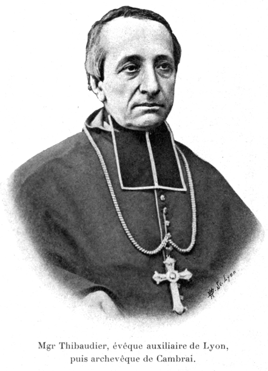 Illustration puor l'Histoire des églises et chapelles de Lyon